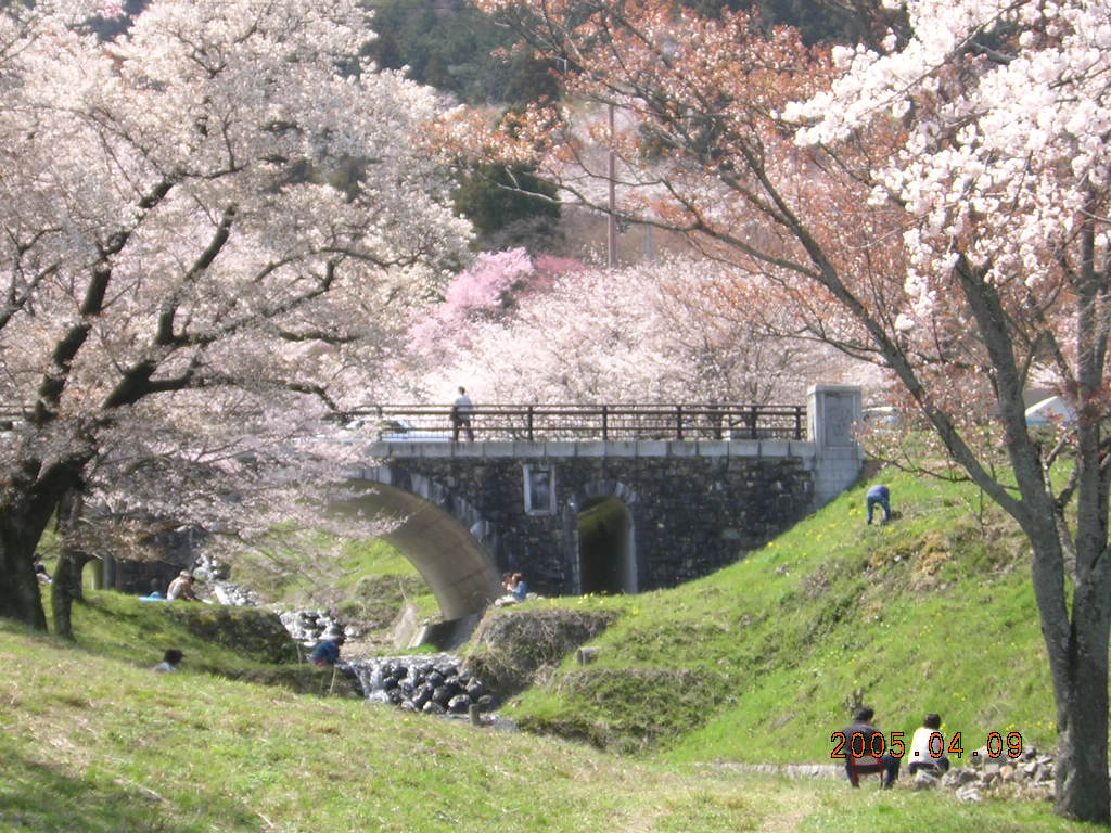 Kamagatani(霞間ヶ渓),Ikeda,Gifu,Japan(岐阜県池田町)で撮影